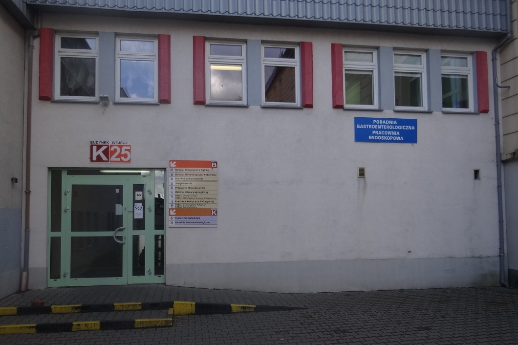 Poradnie - Gastroenterologiczna, Endoskopowa Szpitala Powiatowego SPW ZOZ